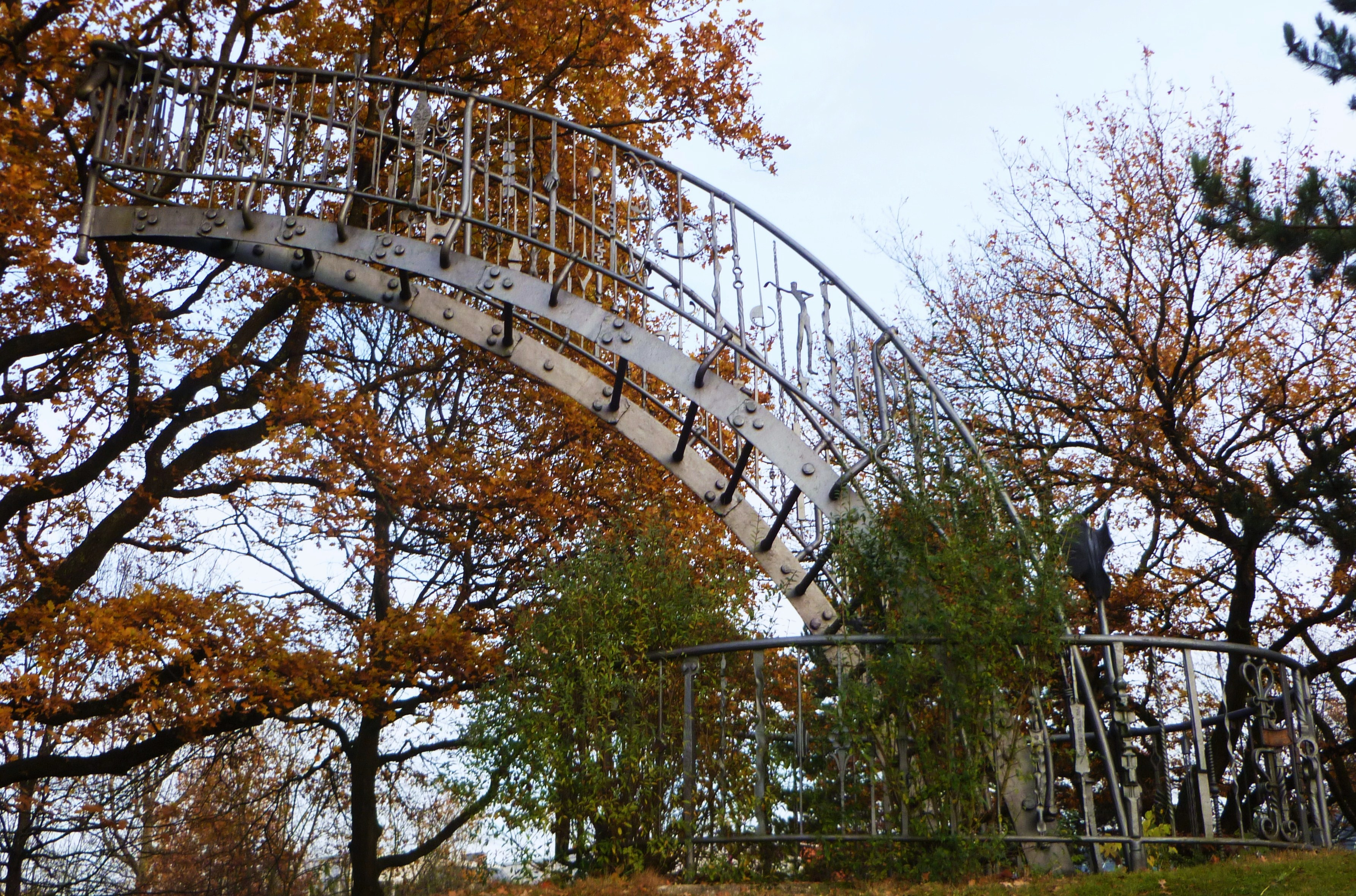 Skulptur "Brücke der Freundschaft", geschweißt anlässlich des 1. Weltkongresses der Kunstschmiede in Aachen, Designer: Manfred Bredohl, 1986; Standort: BGE Tempelhofer Straße, Aachen